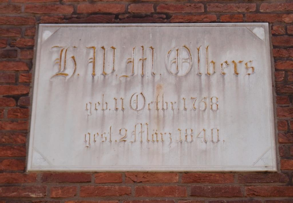 Erinnerung an den Arzt und Astronomen Heinrich Wilhelm Olbers (1758-1840), Bremen, Sandstraße 16